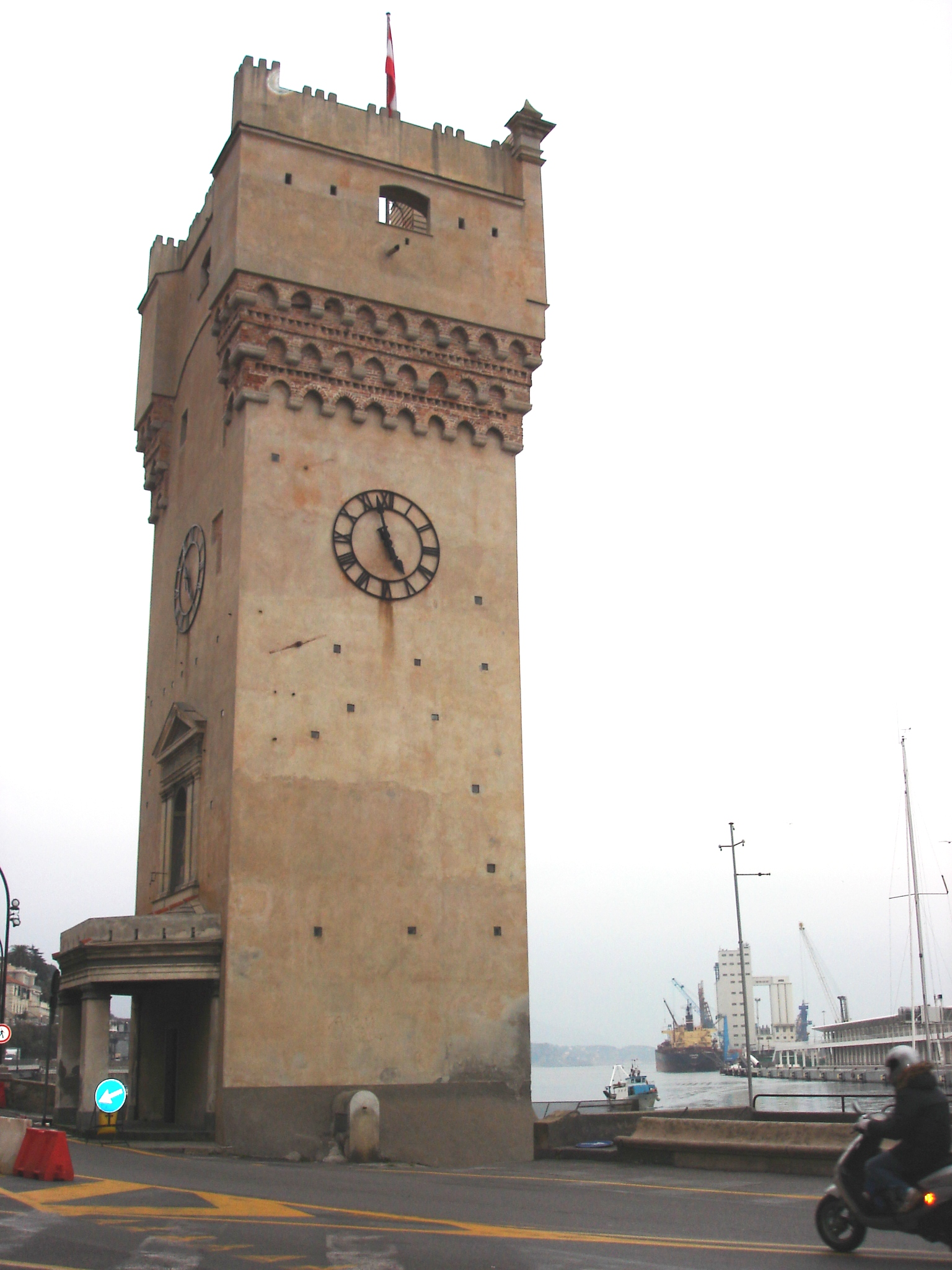 A Torretta Leon Pancaldo, Savona